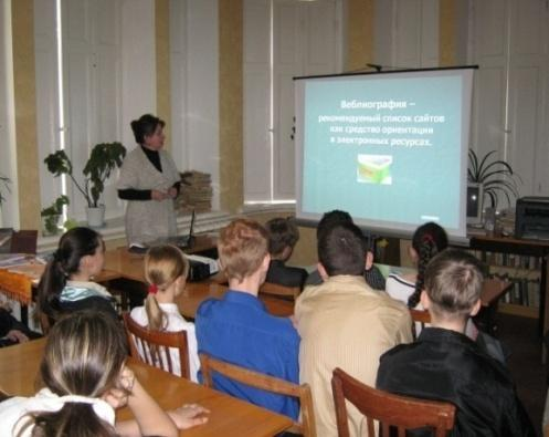 Проведение мероприятия с мультимедийным сопровождением